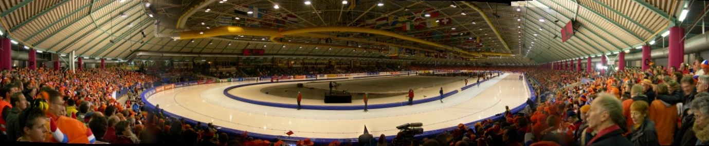 Zelfgemaakte foto tijdens het wk sprint 2006 in Thialf.